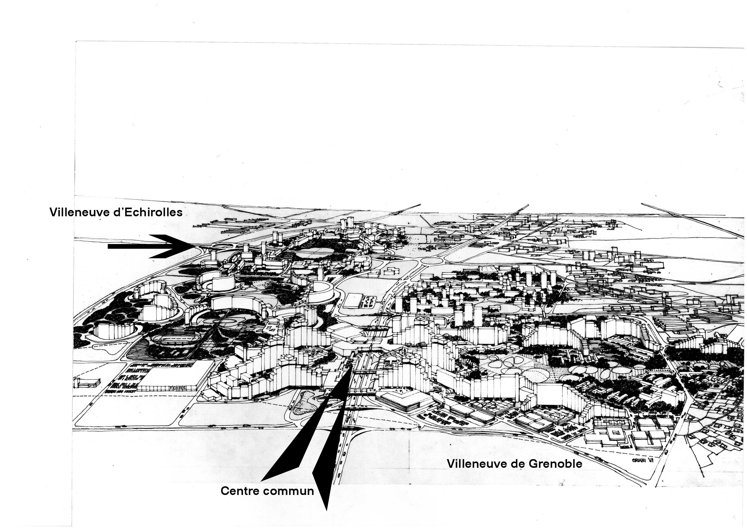 Représentation de la villeneuve De Grenoble et d'Echirolles reliées par le centre